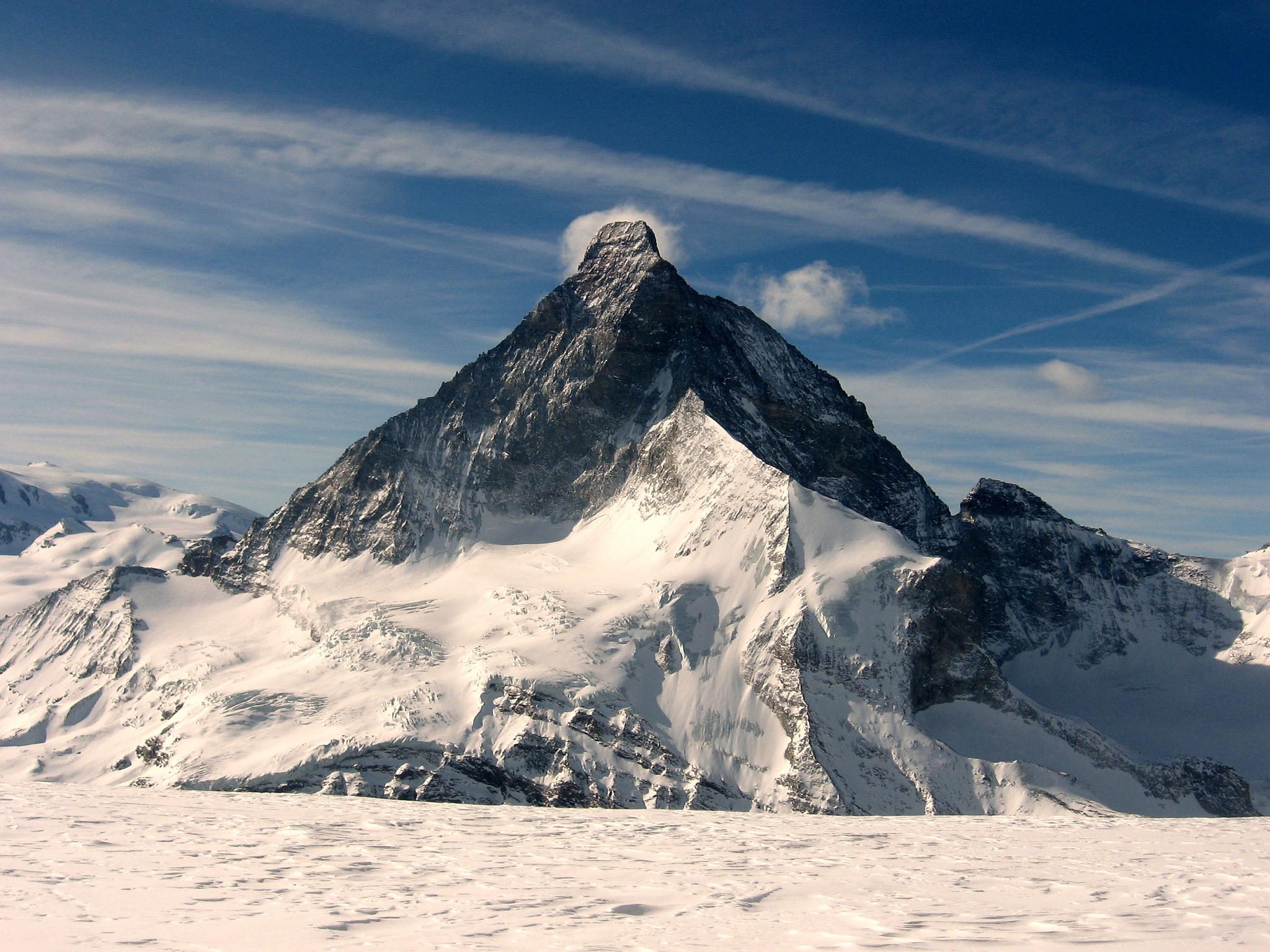 Matterhorn